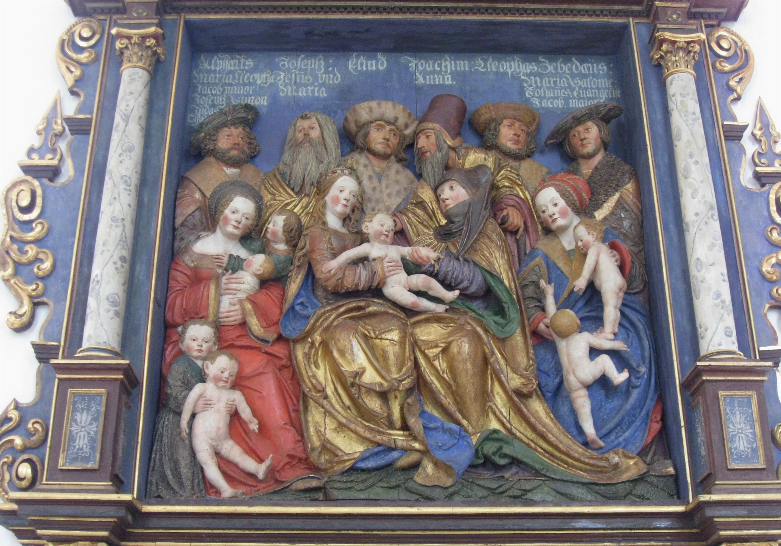 Memminger Straße 9; Katholische Liebfrauenkapelle, Mindelheimer Sippe vom Meister der Mindelheimer Sippe